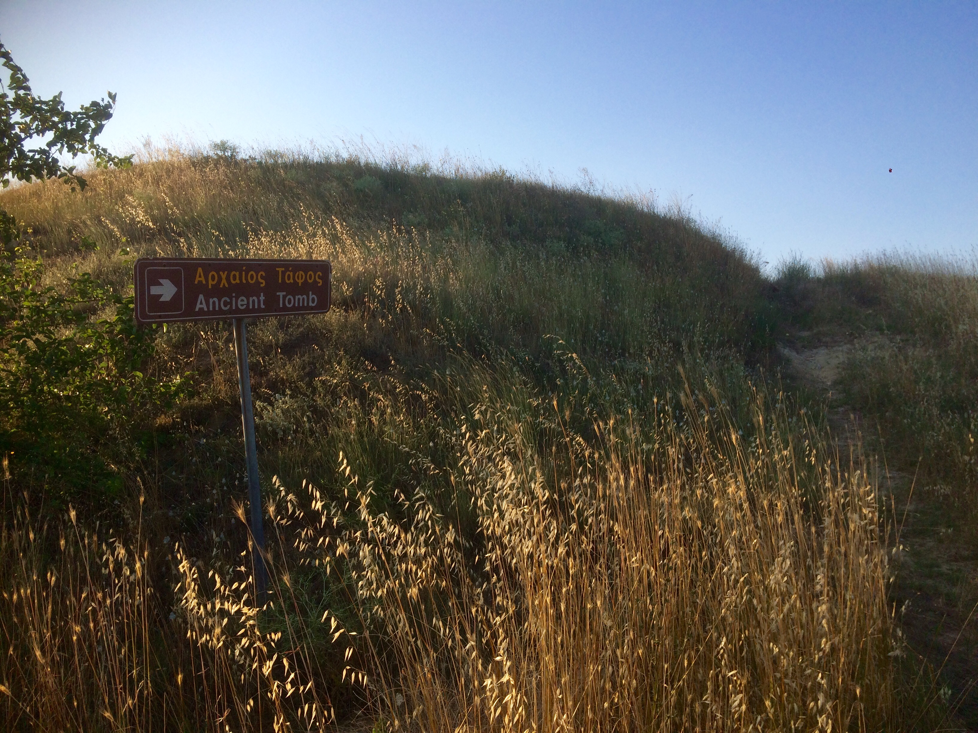 Drei Gräber aus der Antike